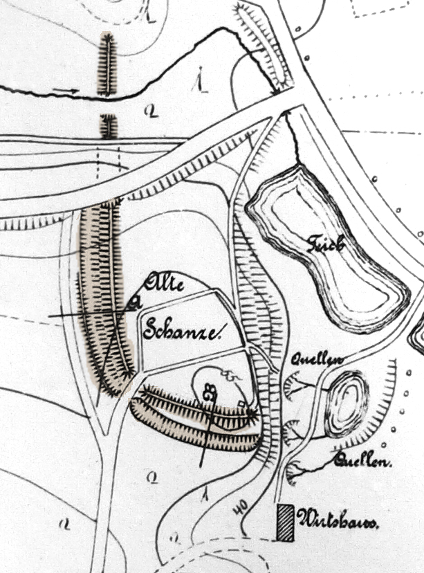 Lageplan der Alten Schanze (Oyle)